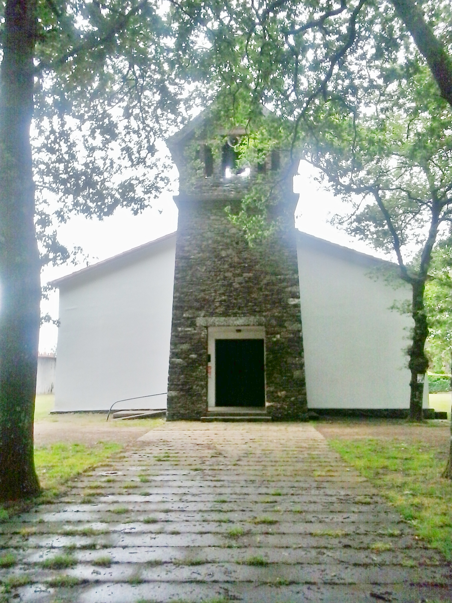 Iglesia en Os Carballos, junto a la N-550